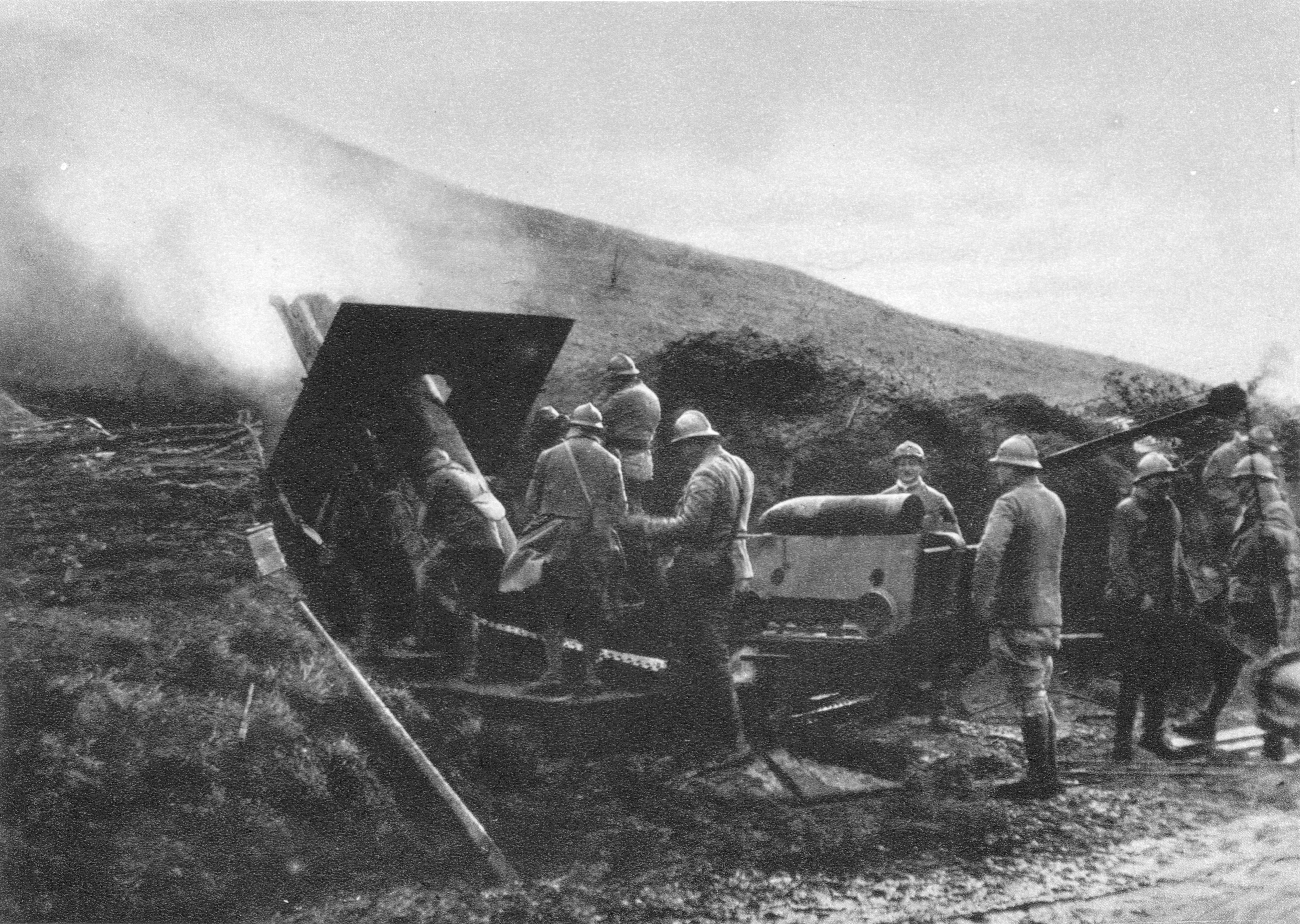 Während des Nahkämpfes bei Aspach eingreifende Artillerie. Eine 24 cm-Kanone feuert auf die deutschen Angreifer (23. Februar 1918).